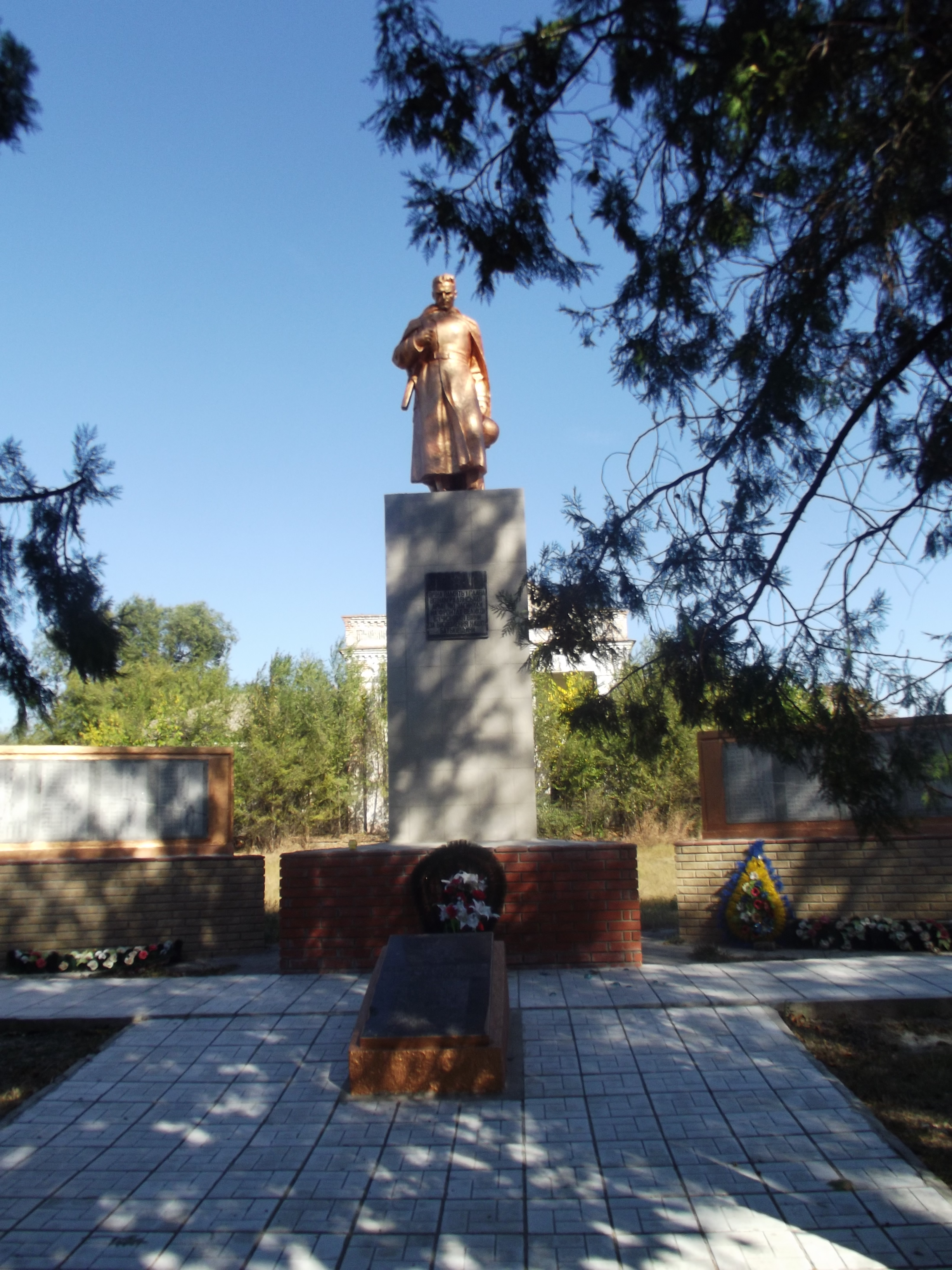 Братська могила у с. Василівка